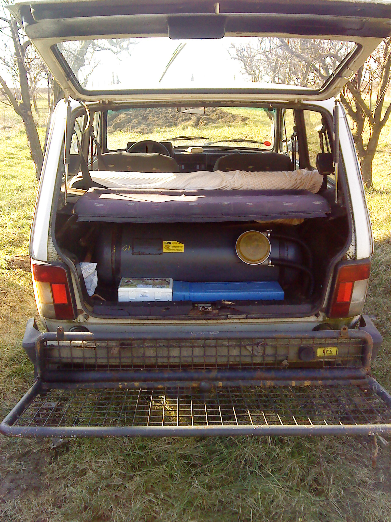 nyított niva hátulról, gáztartállyal